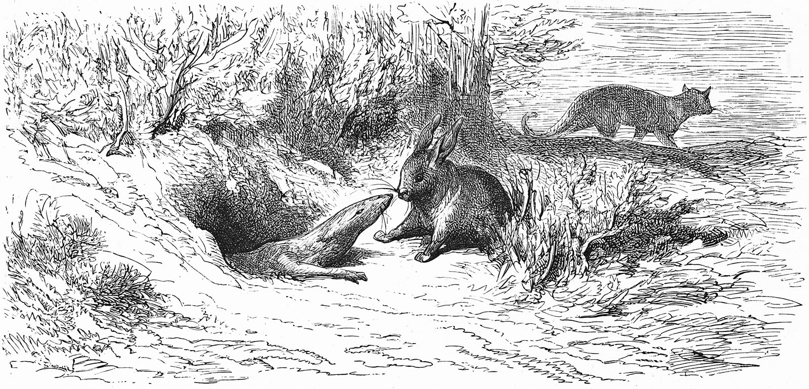 grafika z książki PL Bajki, Jean de La Fontaine, nakładem i drukiem Jana Noskowskiego, Warszawa 1876